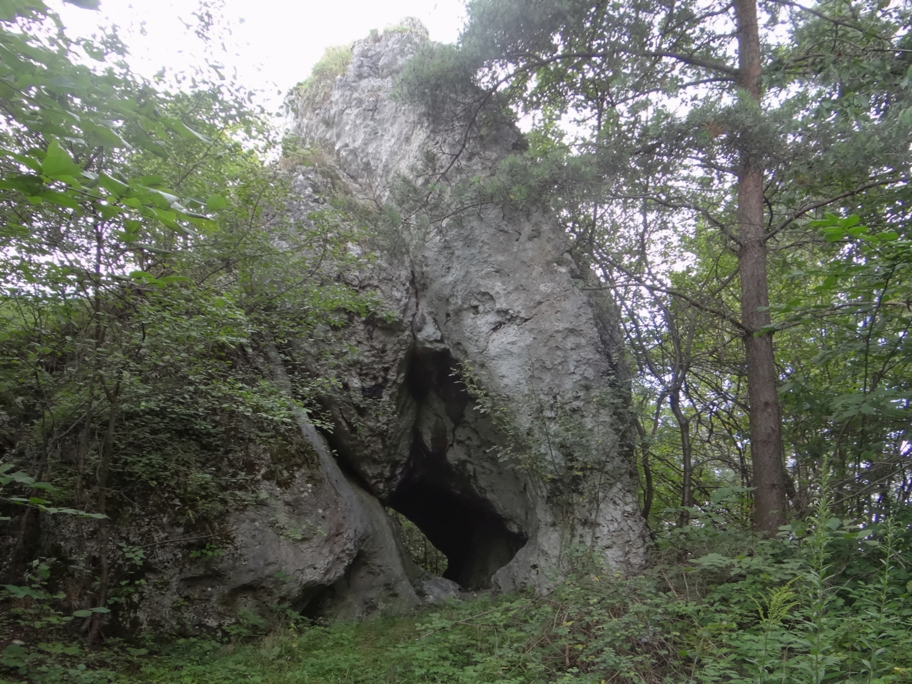 Skała na wzgórzu Dupnica w Ryczowie